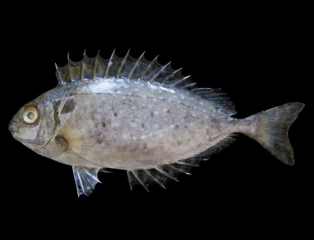 Siganus canaliculatus, mercado de Kampuan, Suksamran, Ranong , sur de Tailandia, 2010,122.8 mm